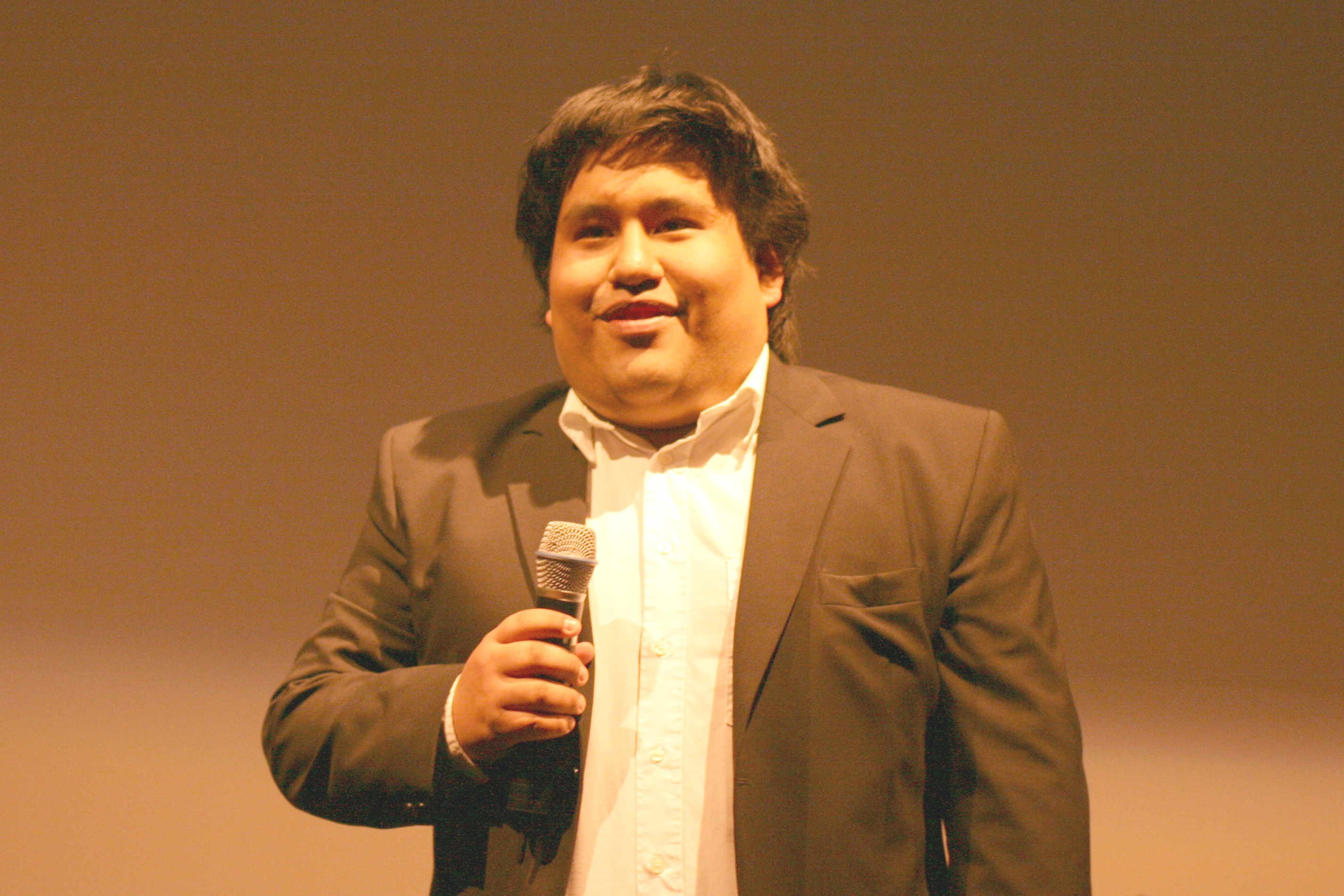 Simon Valvik før paneldebatten i forbindelse med førpremieren på filmen Urospredere.